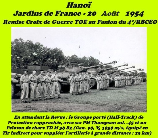 4.RBCEO - Den Abmarsch abwartend